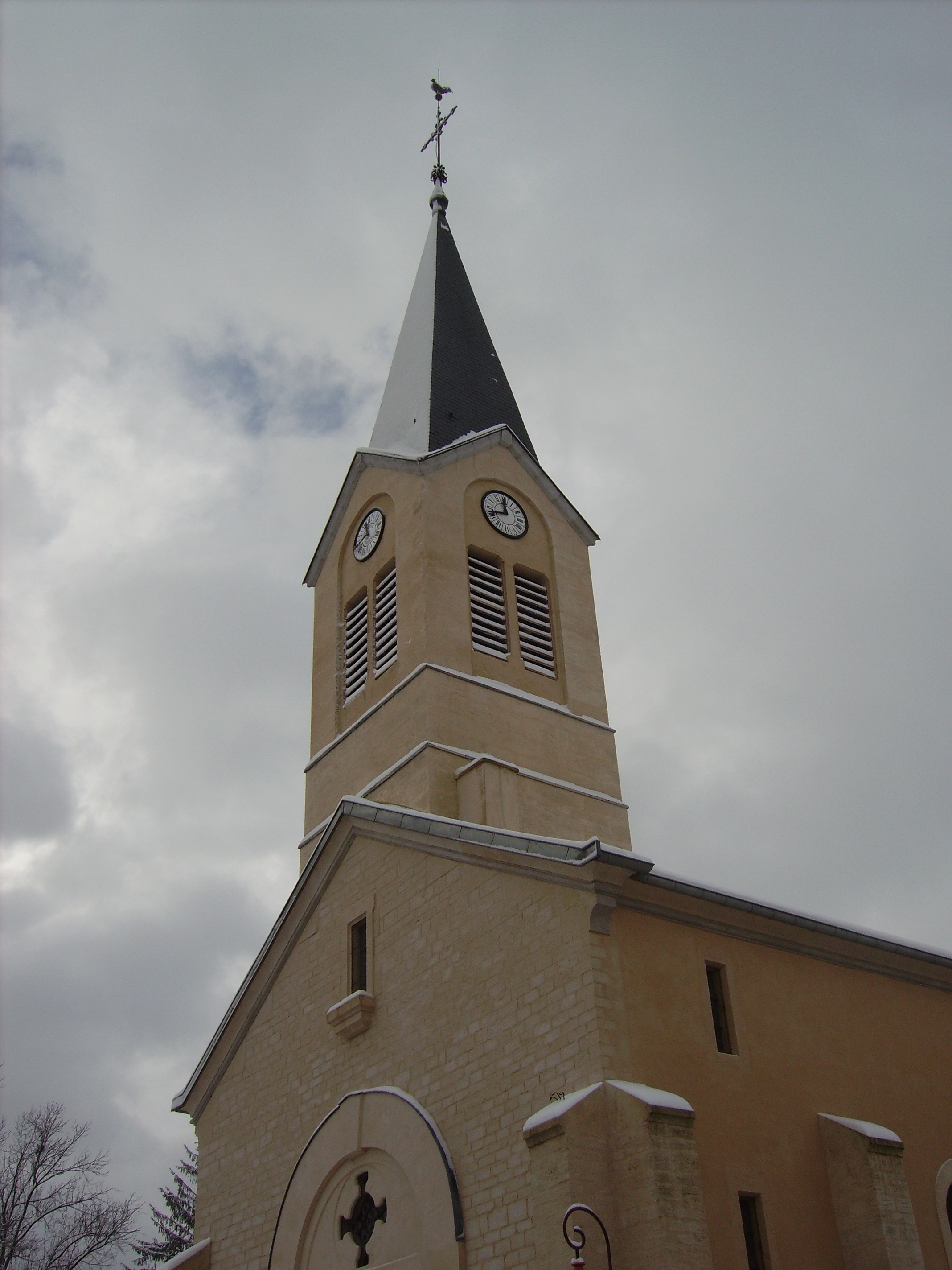 Clocher de l'église de Velars-sur-Ouche (Côte d'Or - France)